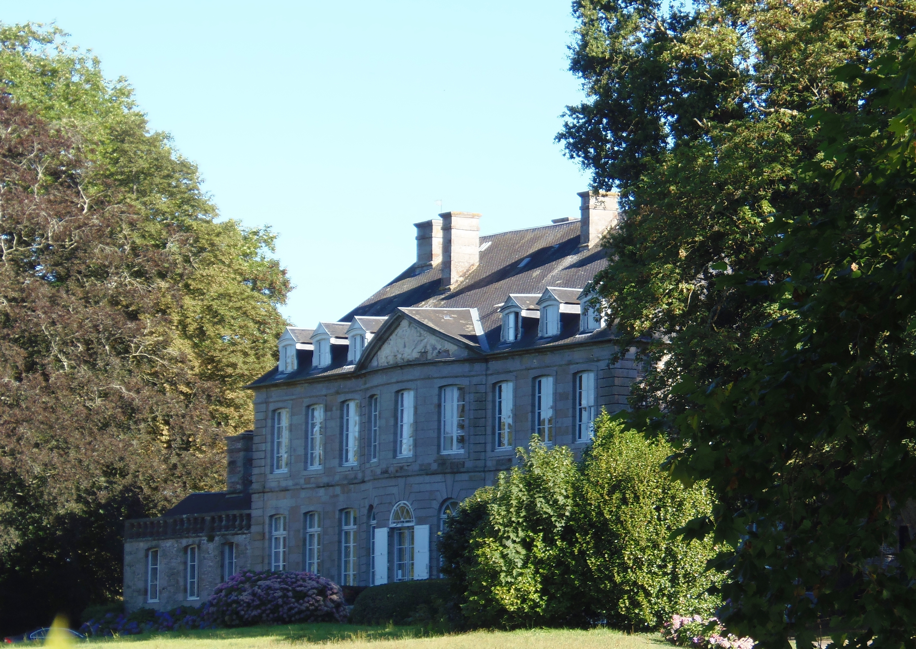 Vergoncey (Normandie, France). Le château de Boucéel.